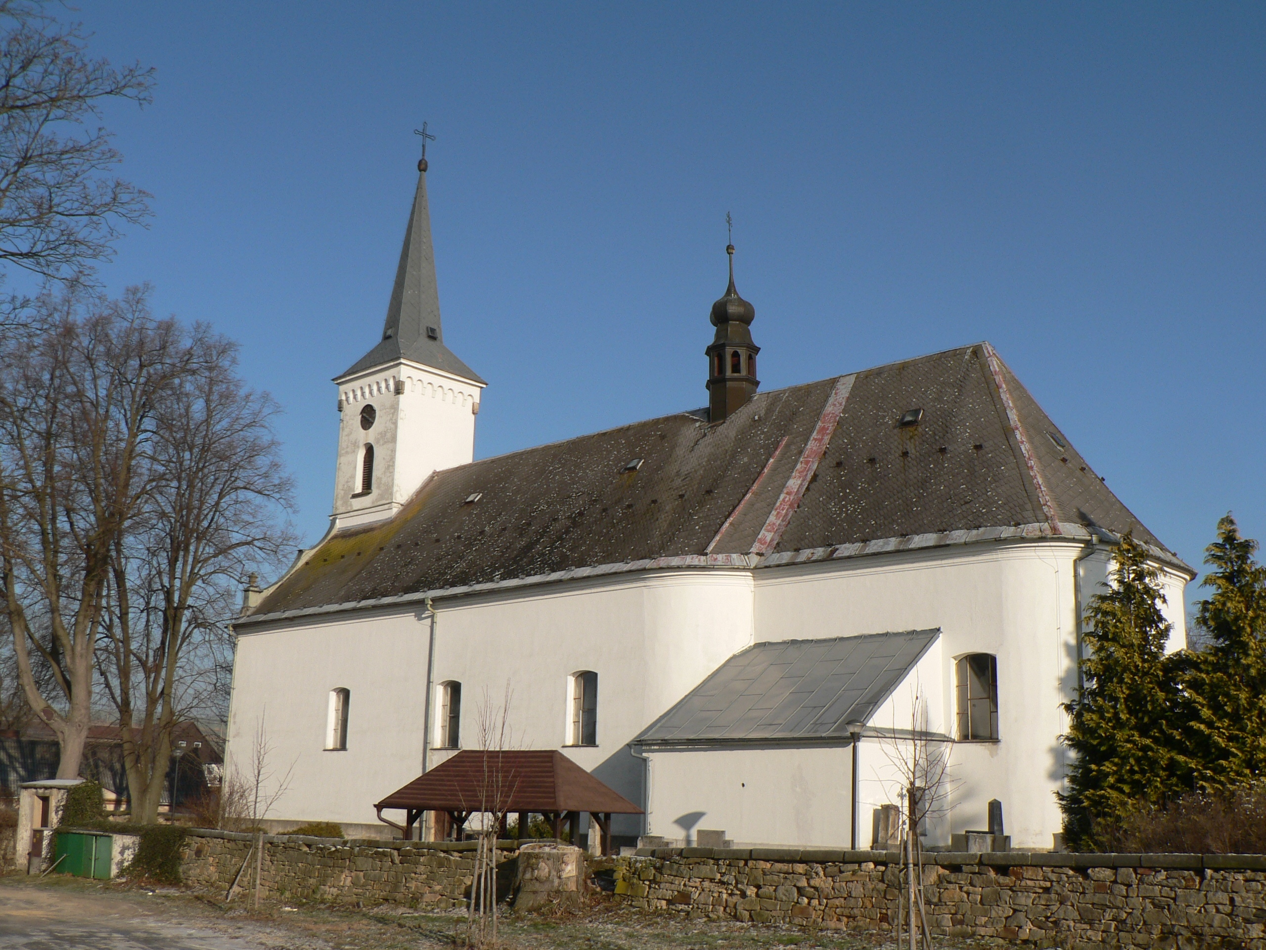 Kostel svatého Mikuláše (Starý Maletín)